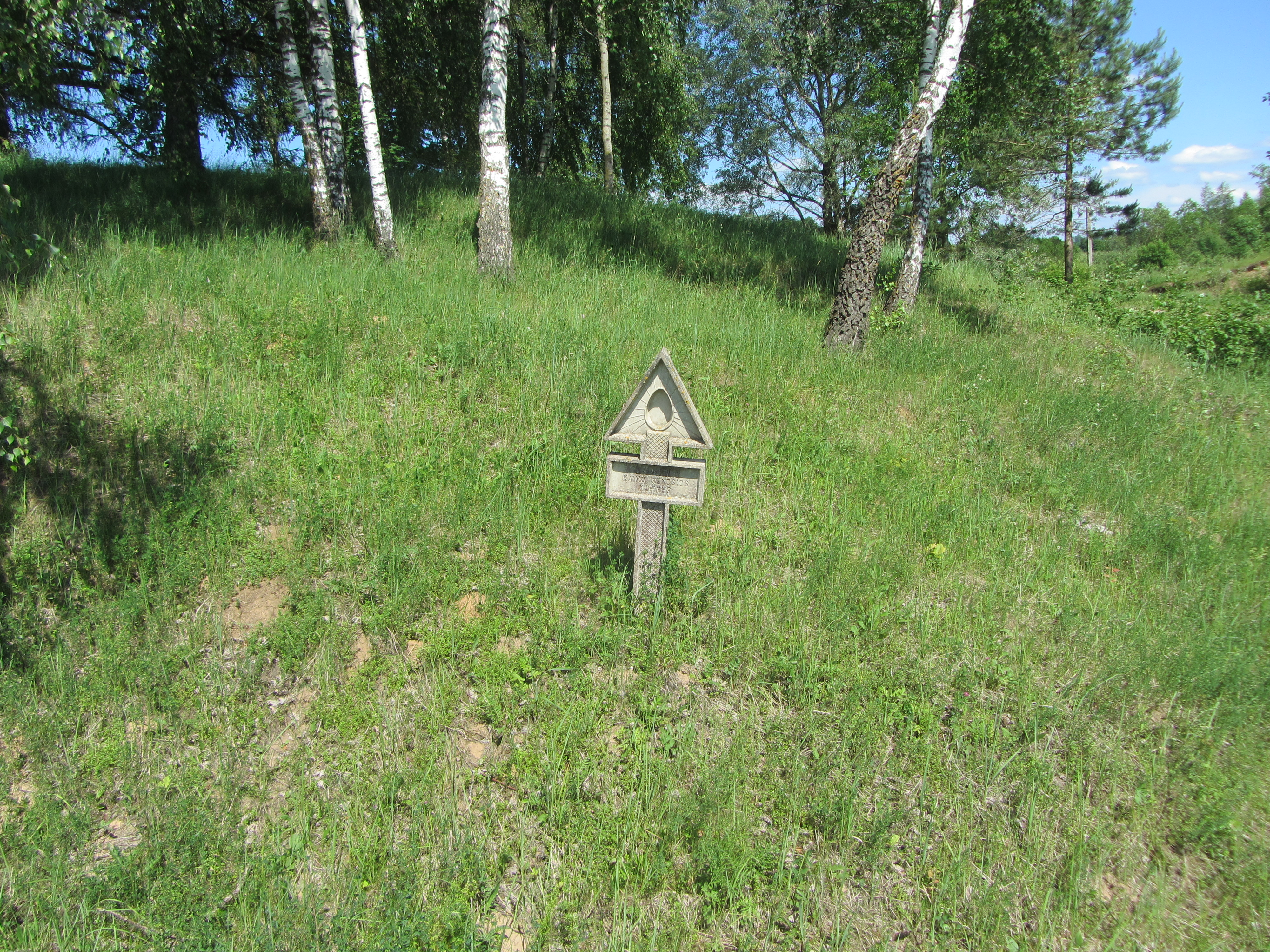 Giedraičių sen., Lithuania